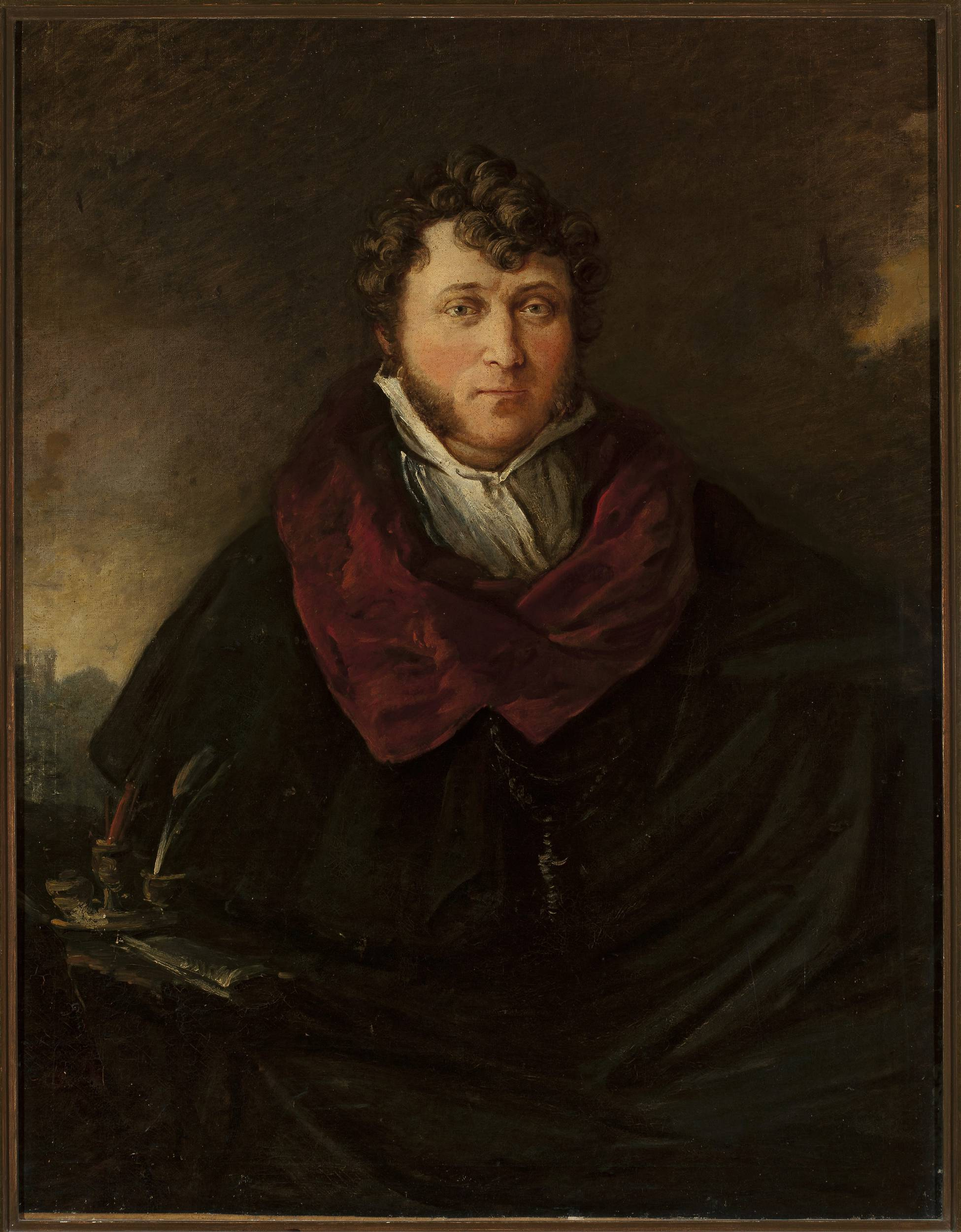 Piotr Michałowski, (1800-1855) (malarz); Portret Antoniego Ostrowskiego; ok.1824; olej; płótno; 106,5 x 83